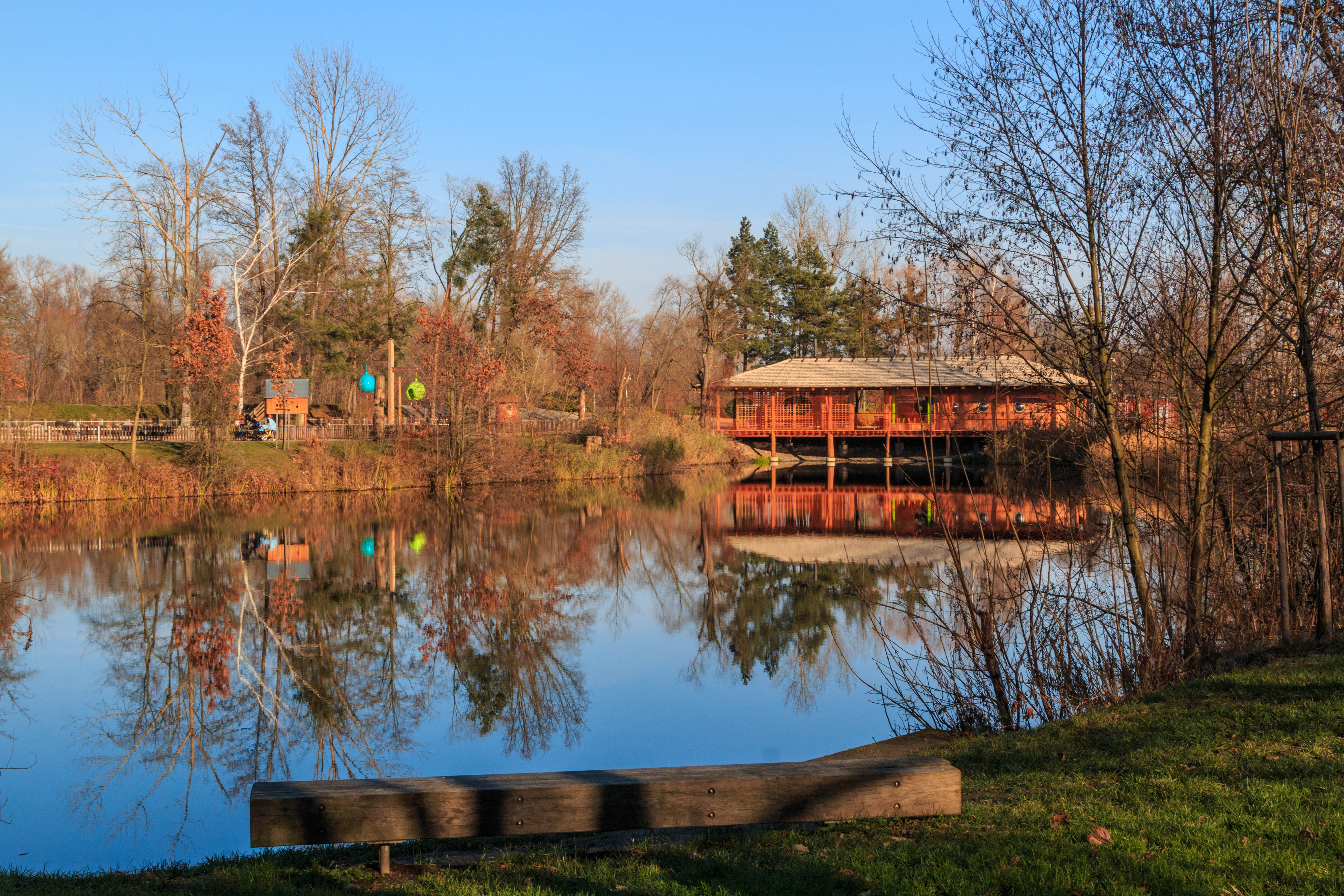 Mrtvé rameno Čičák Project: Vodstvo